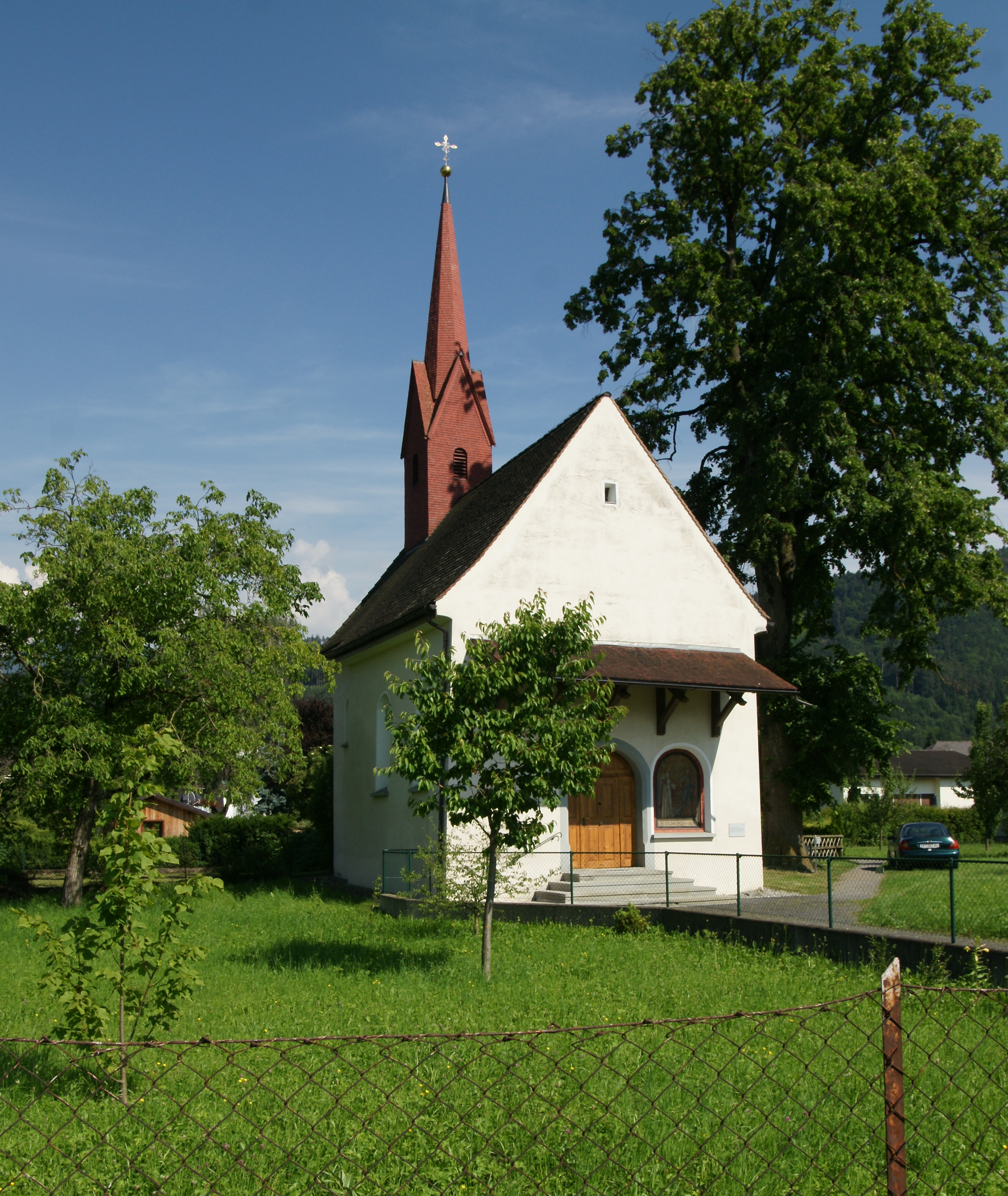 Pfarrkirche hll. Petronilla und Martin in Altenstadt (Feldkirch).